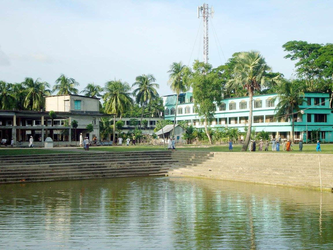 গওহরডাঙ্গা মাদ্রাসা